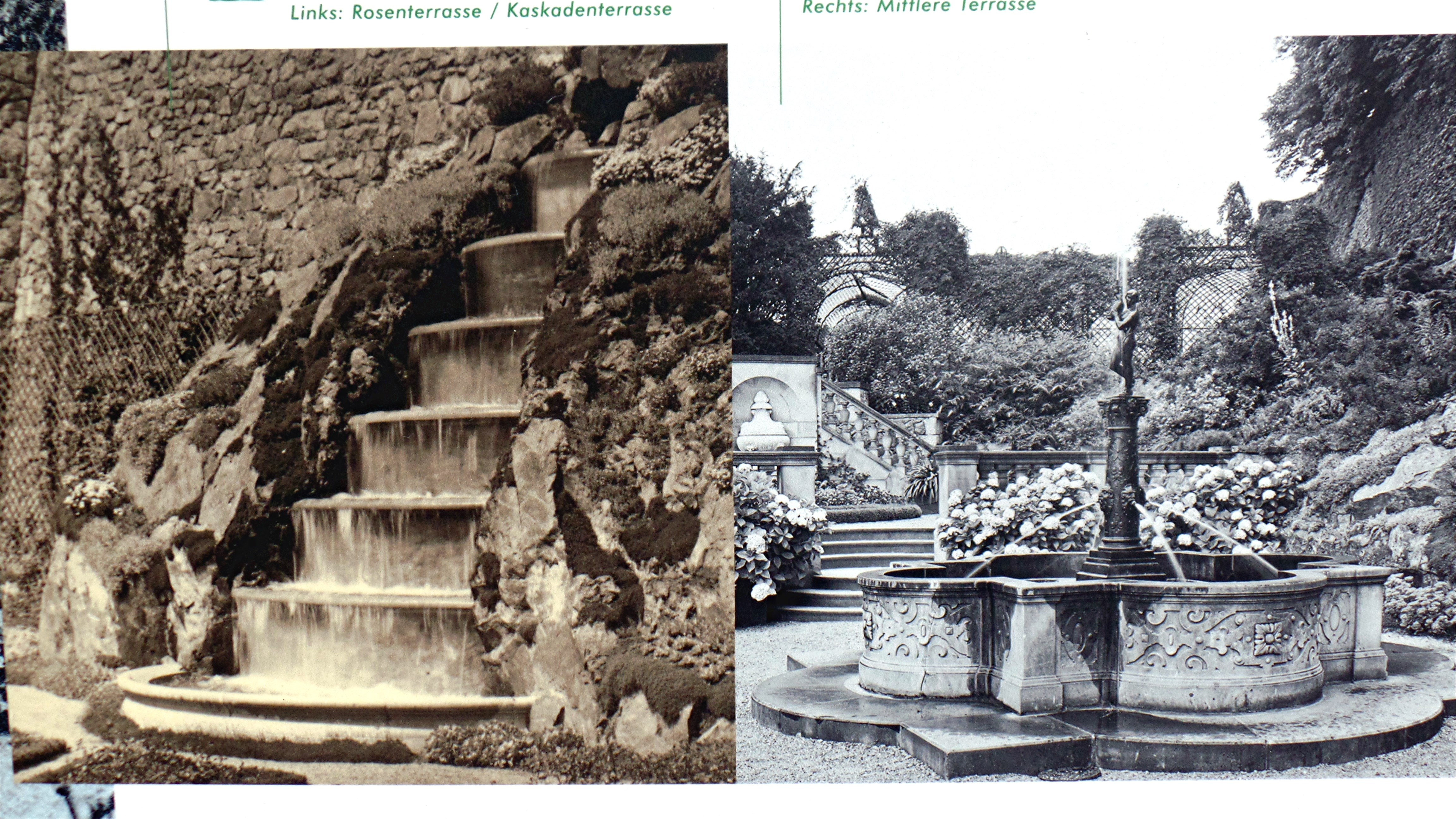 Infotafel der Fürstensteiner Schlossterassen